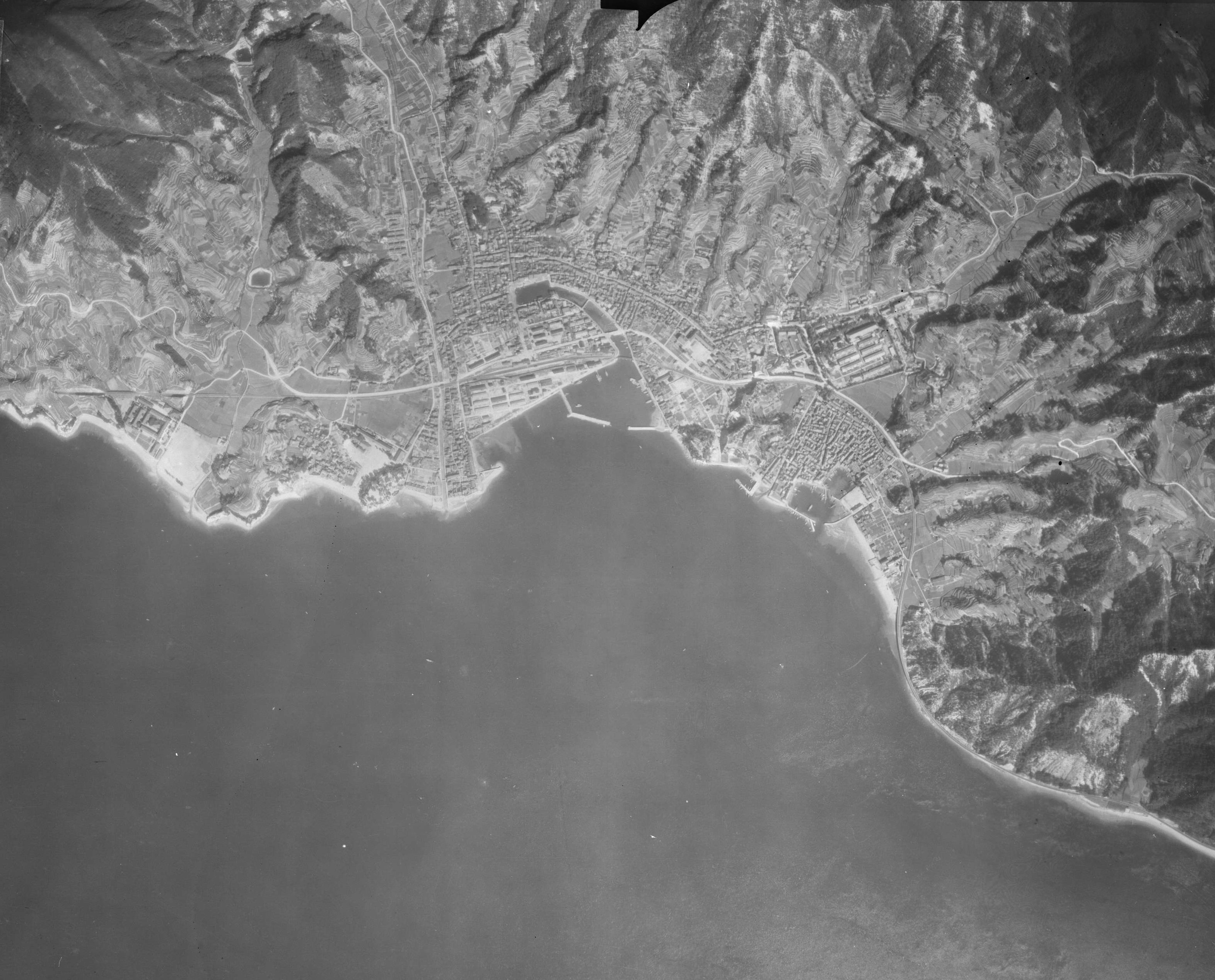 1947年の広島県竹原市忠海地区。